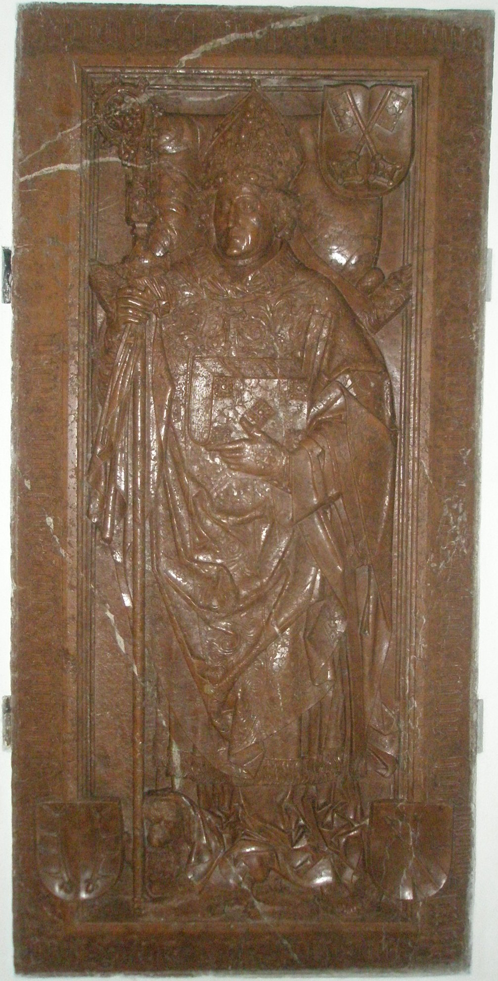 Grabdenkmal Propst Balthasar Hirschauer († 1508, Stiftskirche Berchtesgaden))